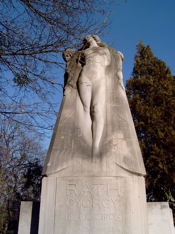 Ráth György (Szeged, 1828. máj. 6. – Bp., 1905. júl. 7.): történelmi, jogi és művészettörténeti író, könyv- és régiséggyűjtő. Kerepesi temető: 10/1-1-1 [szobrász: Maróti Géza]